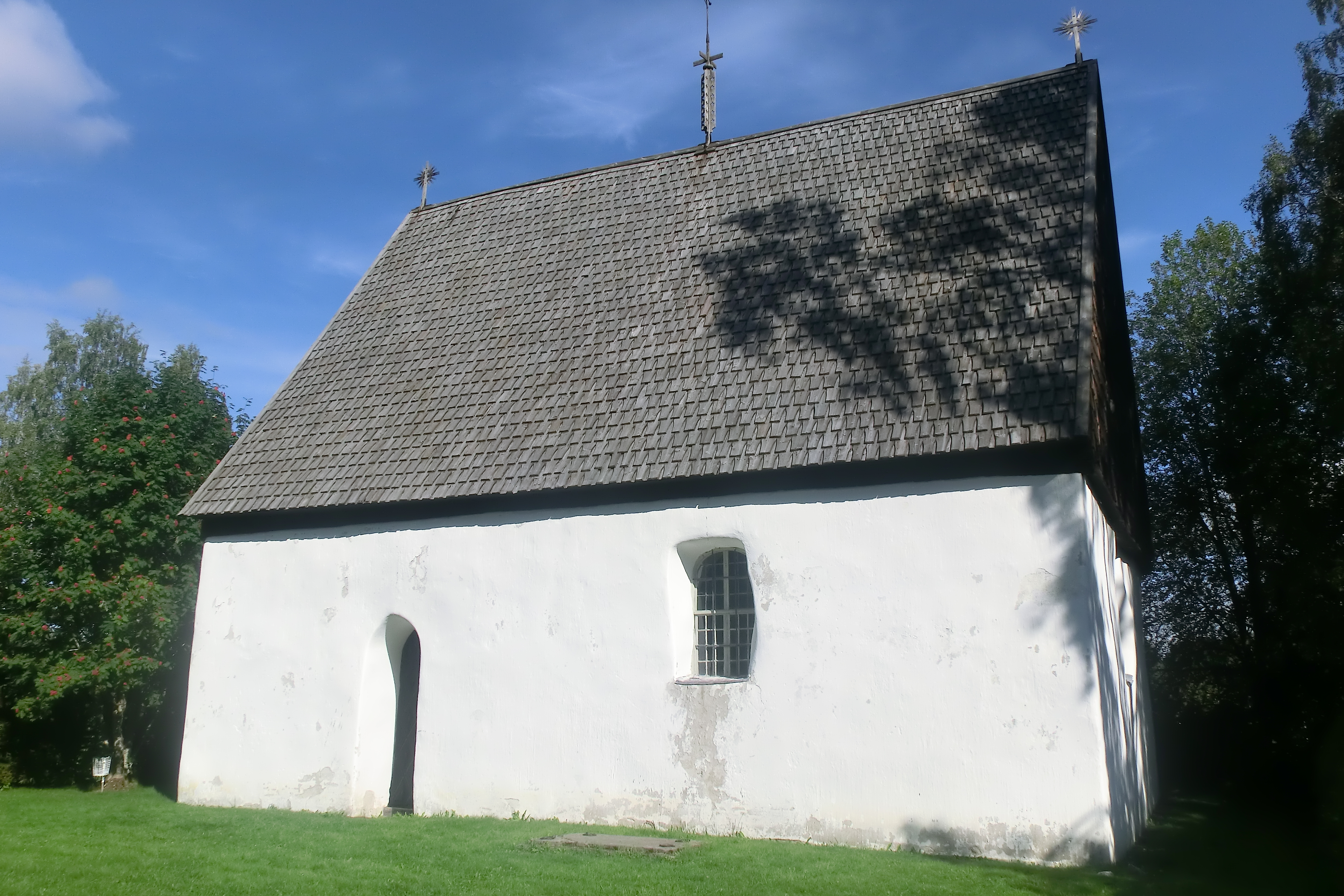 Ramsele gamla kyrka